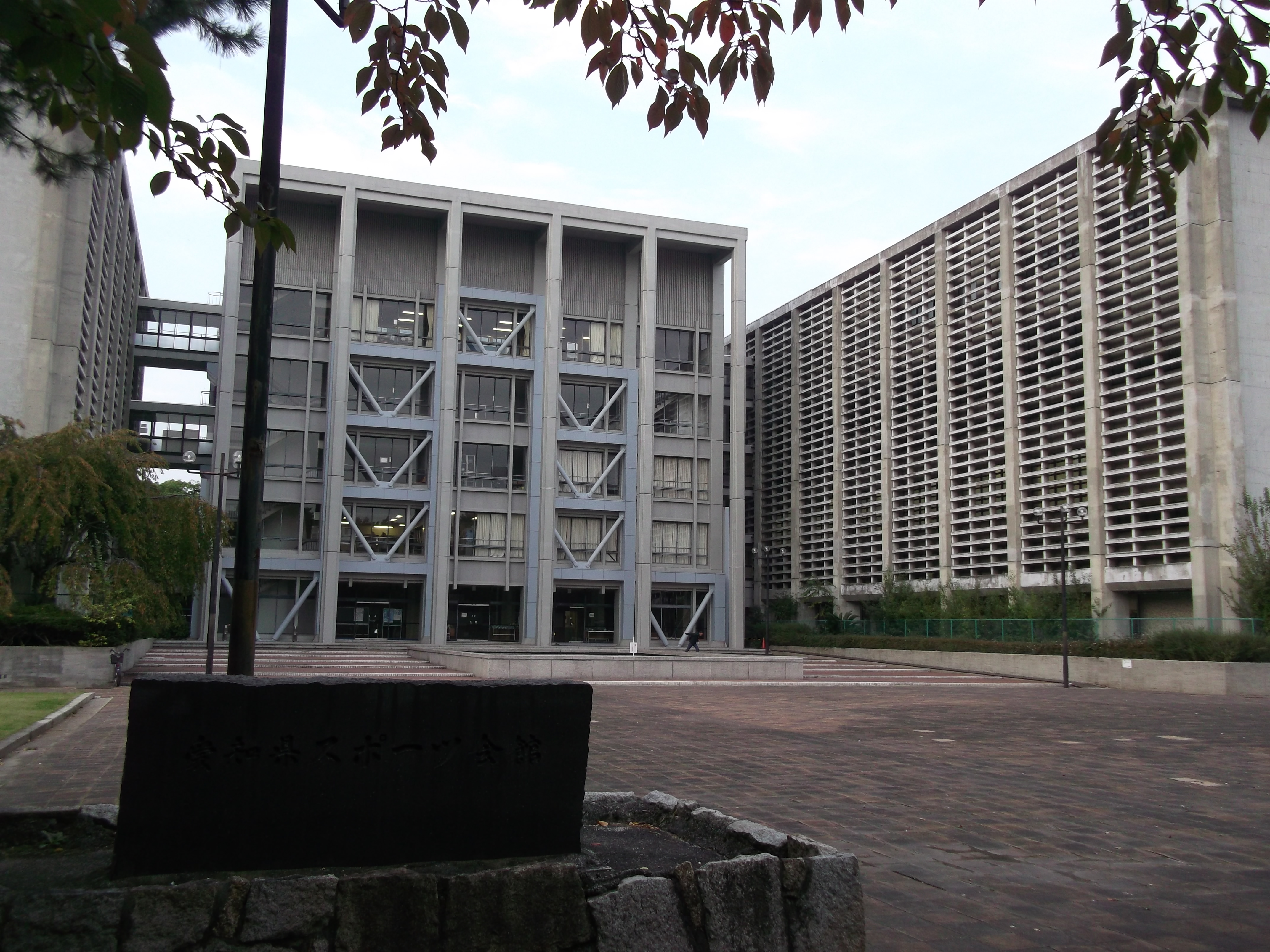 名古屋市北区名城一丁目の愛知県スポーツ会館を南側公道より撮影。画面左下に銘板